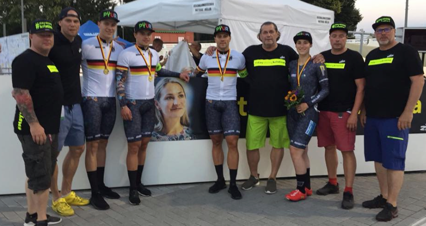 Team Erdgas #staystrongkristina, v.l.n.r.: xx, Sascha Hübner, Nik Schröter, Maximilian Dörnbach, Maximilian Levy, Michael Hübner, Pauline Grabosch, Jens Fiedler, xx